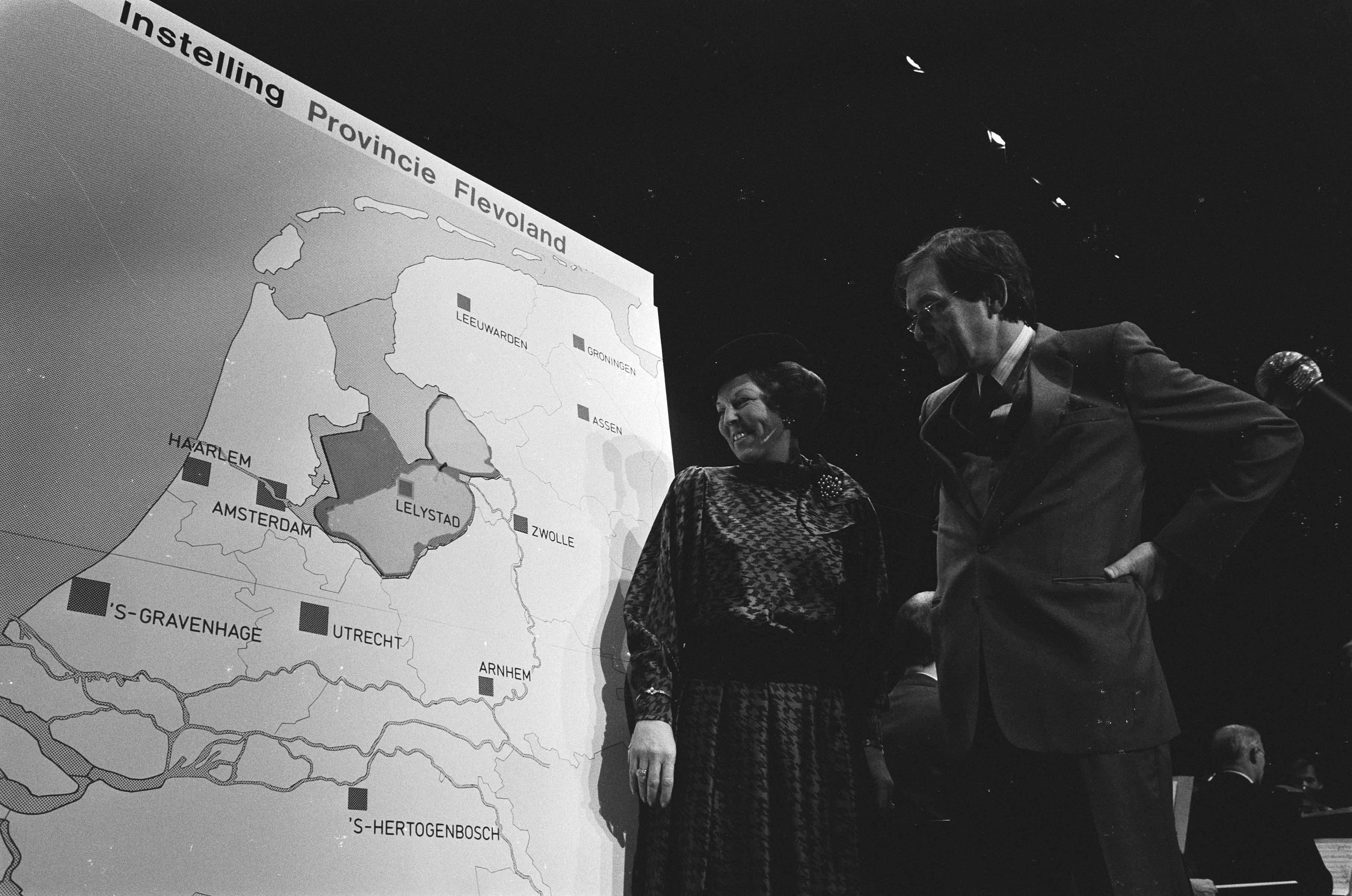 Collectie / Archief : Fotocollectie Anefo Reportage / Serie : Koningin Beatrix woonde in Lelystad de proclamatie van nieuwe provincie Flevoland bij met Commissaris van de Koningin Lammers Beschrijving : Koningin Beatrix en Commissaris van de Koningin Lammers voor een kaart van Flevoland Datum : 9 januari 1986 Locatie : Flevoland, Lelystad Trefwoorden : commissarissen van de koningin, koninginnen, landkaarten, provincies Persoonsnaam : Beatrix (koningin Nederland), Beatrix, koningin, Lammers, J.ch.J. Fotograaf : Rob Croes / Anefo, [onbekend] Auteursrechthebbende : Nationaal Archief Materiaalsoort : Negatief (zwart/wit) Nummer archiefinventaris : bekijk toegang 2.24.01.05 Bestanddeelnummer : 933-5310